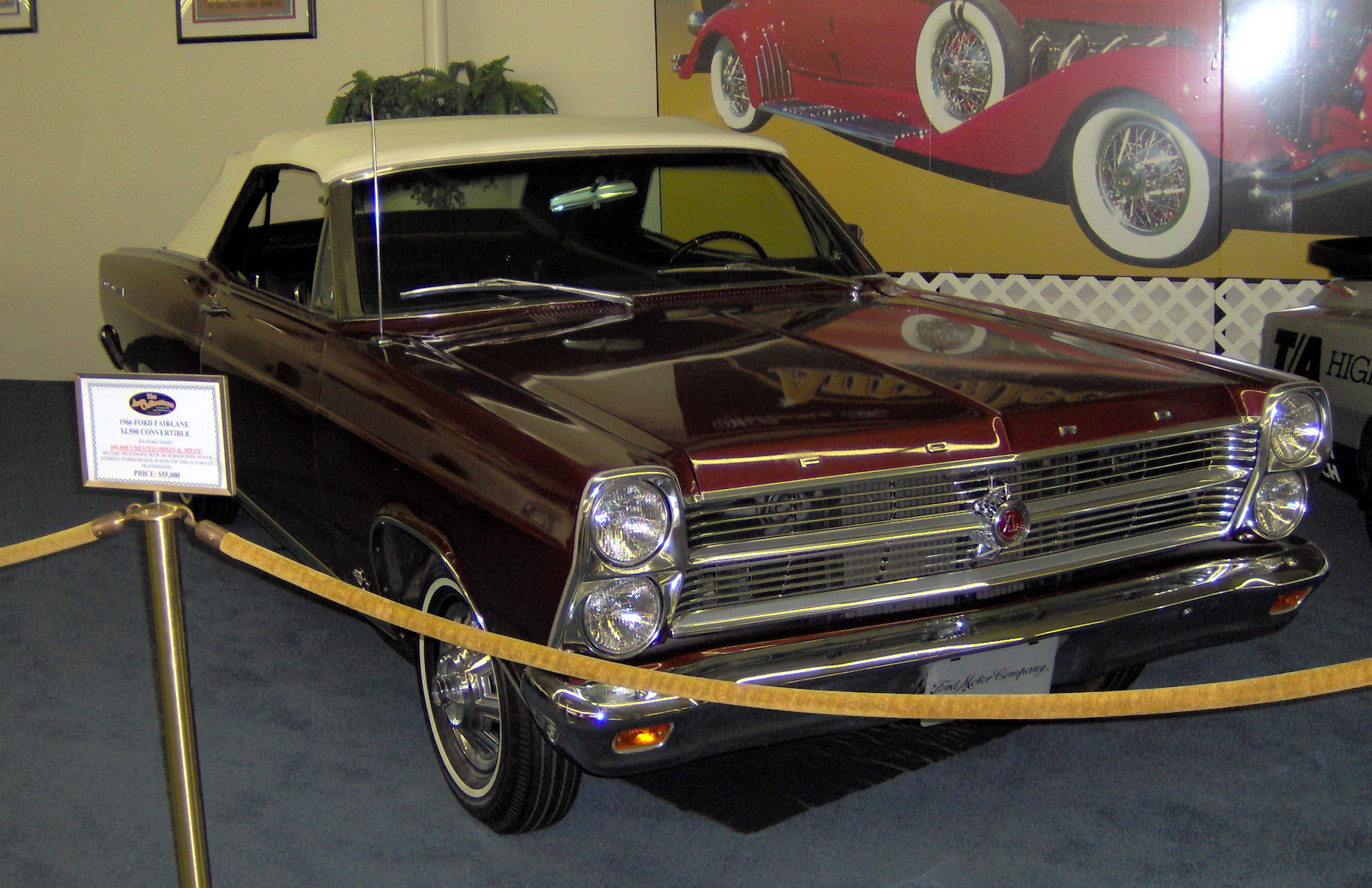 1966 Ford Fairlane XL500 Convertible